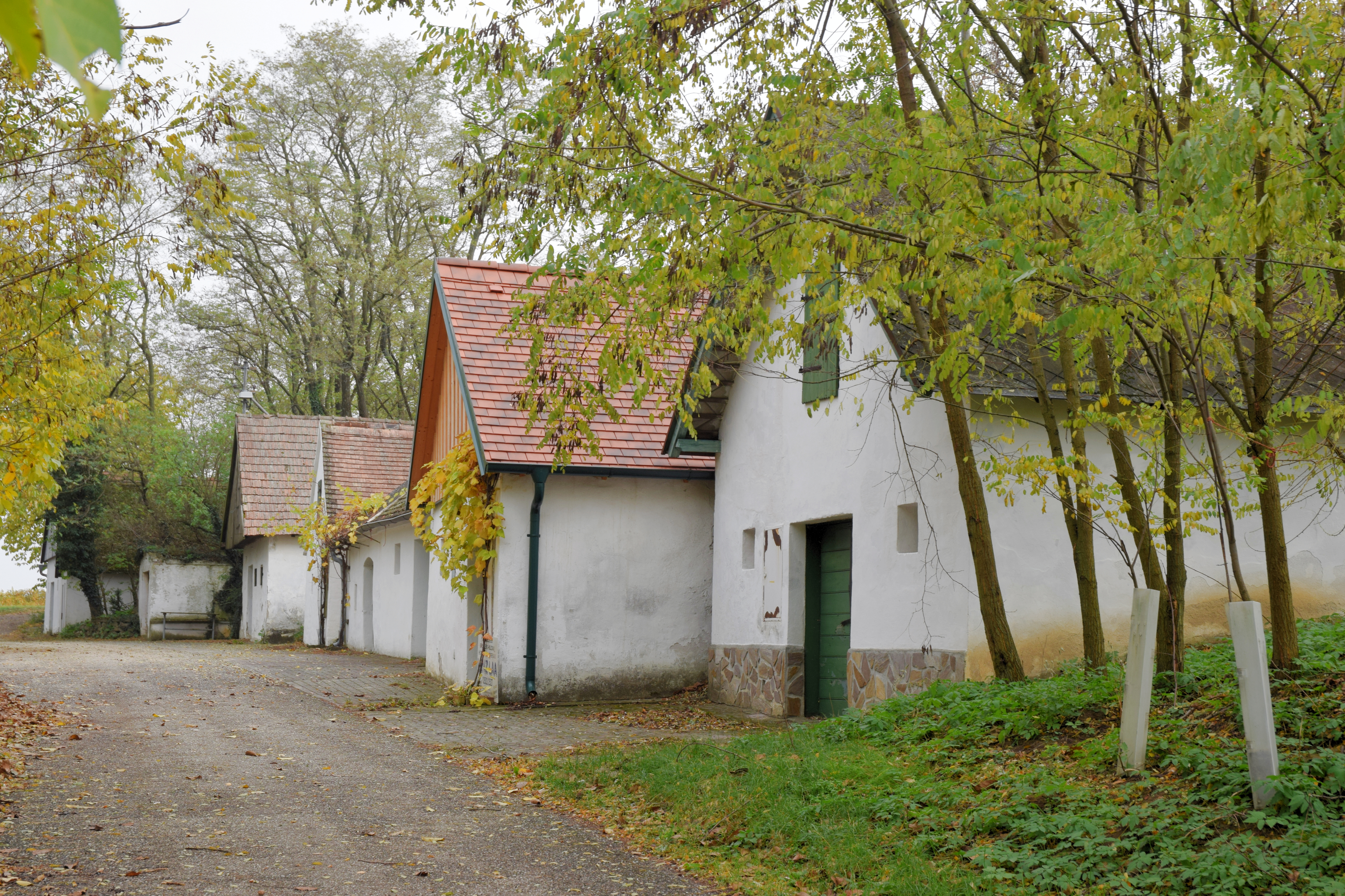 Objekte in der Kellergasse Loamgstettn in der KG Ameis in Staatz